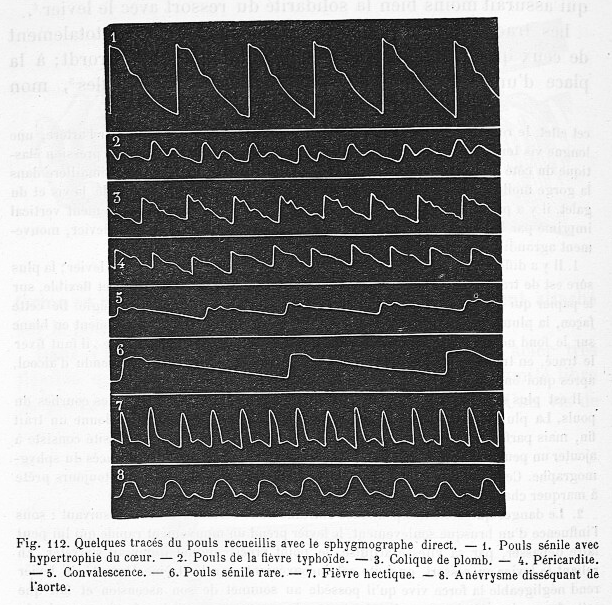 Quelques tracés du pouls recueillis avec le sphygmographe direct de Marey. - 1. Pouls sénile avec hypertrophie du cœur. - 2. Pouls de la fièvre typhoïde. - 3. Colique de plomb. - 4. Péricardite. - 5. Convalescence. - 6. Pouls sénile rare. - 7. Fièvre hectique. - 8. Anévrysme disséquant de l'aorte.